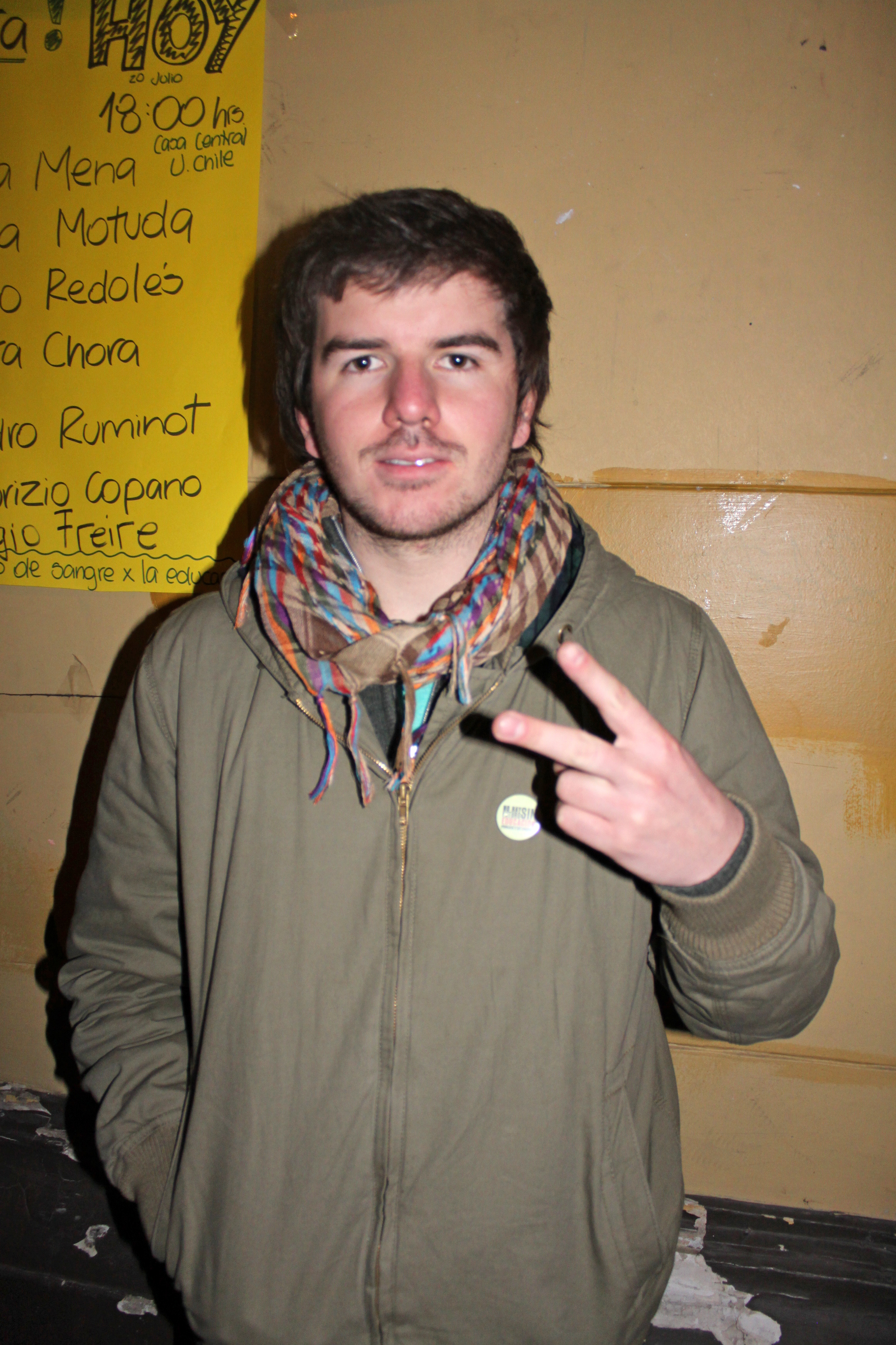 Giorgio Jackson, presidente de la FEUC y uno de los líderes de la movilización estudiantil en Chile de 2011.